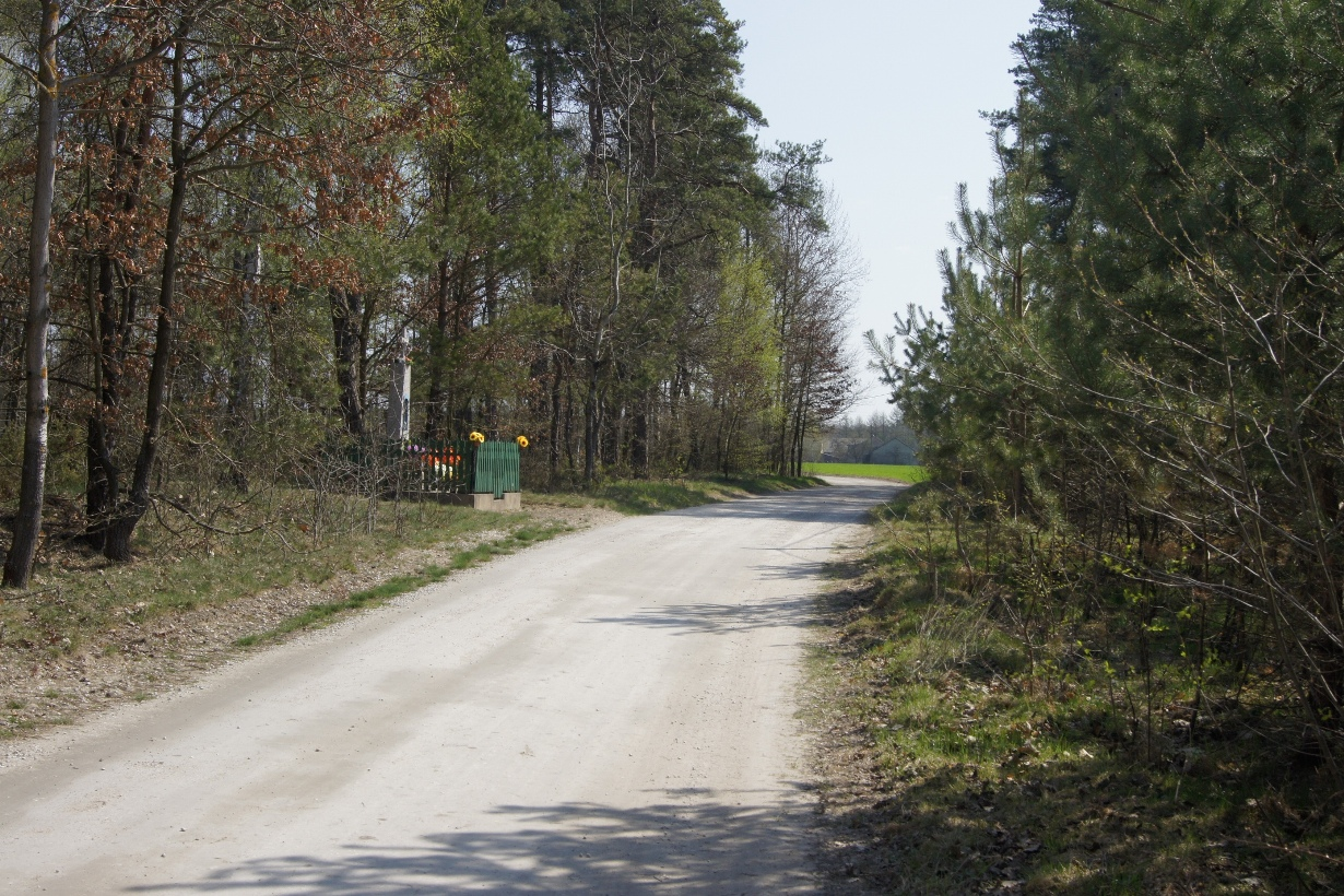 kapliczka